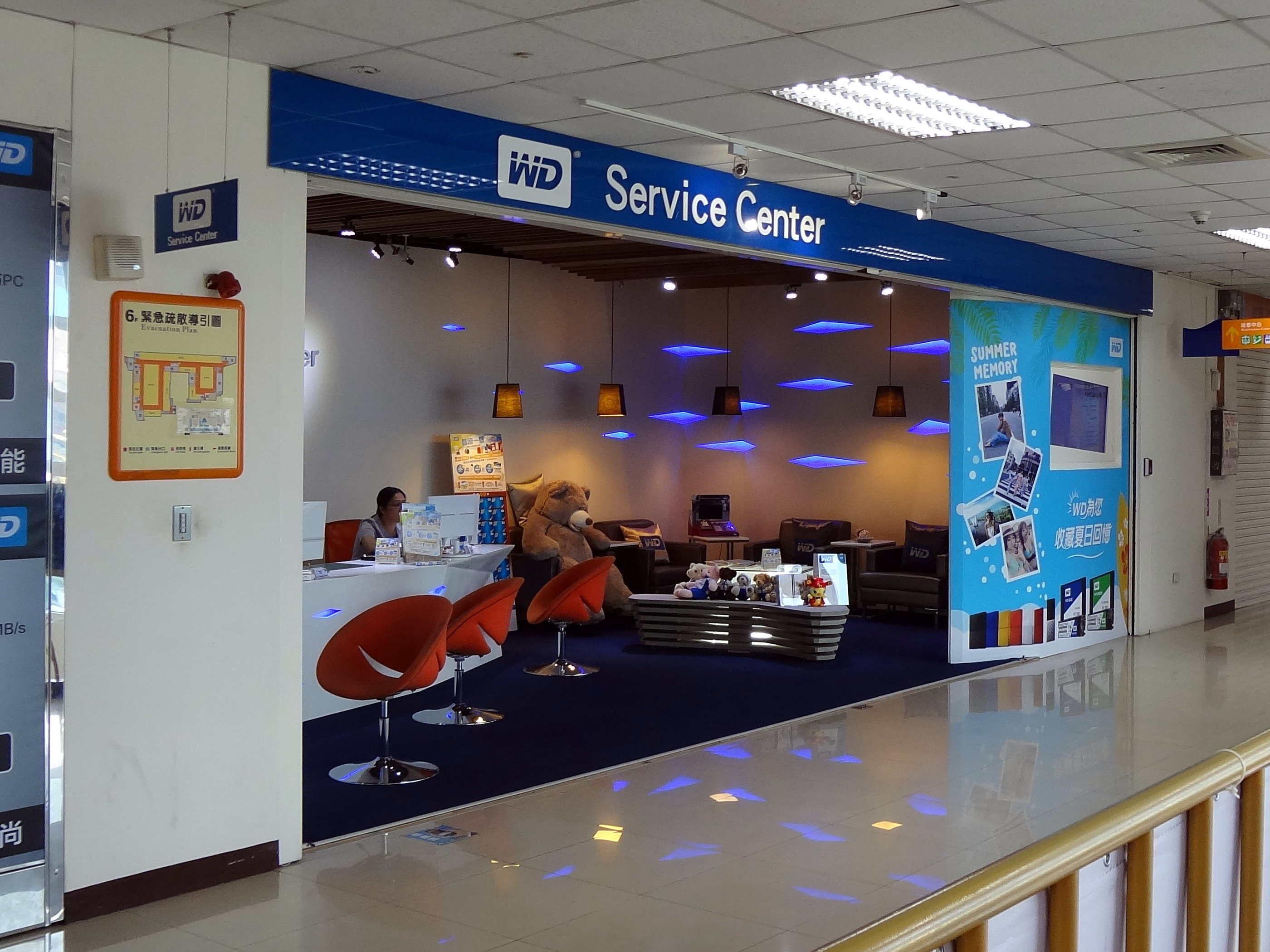 台灣威騰電子股份有限公司於光華數位新天地6樓開設的WD直營顧客服務中心。